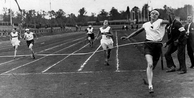 Jutta Treitschke vom ASV Dresden (rechts im Bild) bei den Hochschulmeisterschaften 1929.